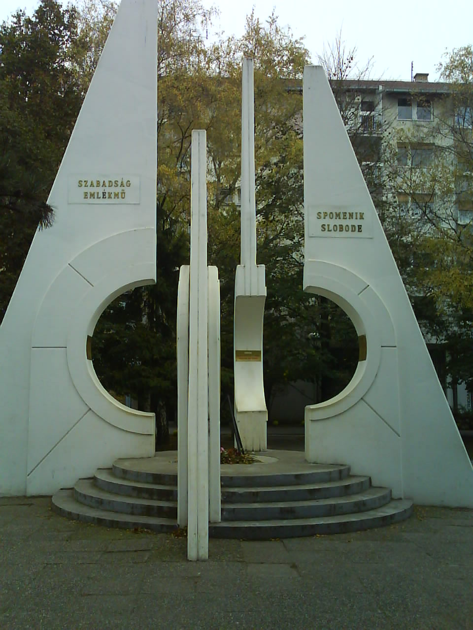 Spomenik oslobodiocima Temerina u Drugom svetskom ratu